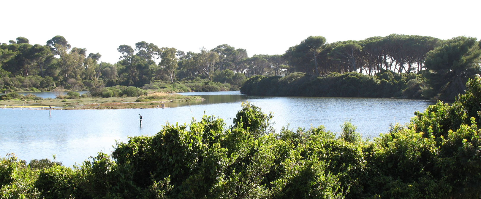 Île Sainte-Marguerite, Cannes, France